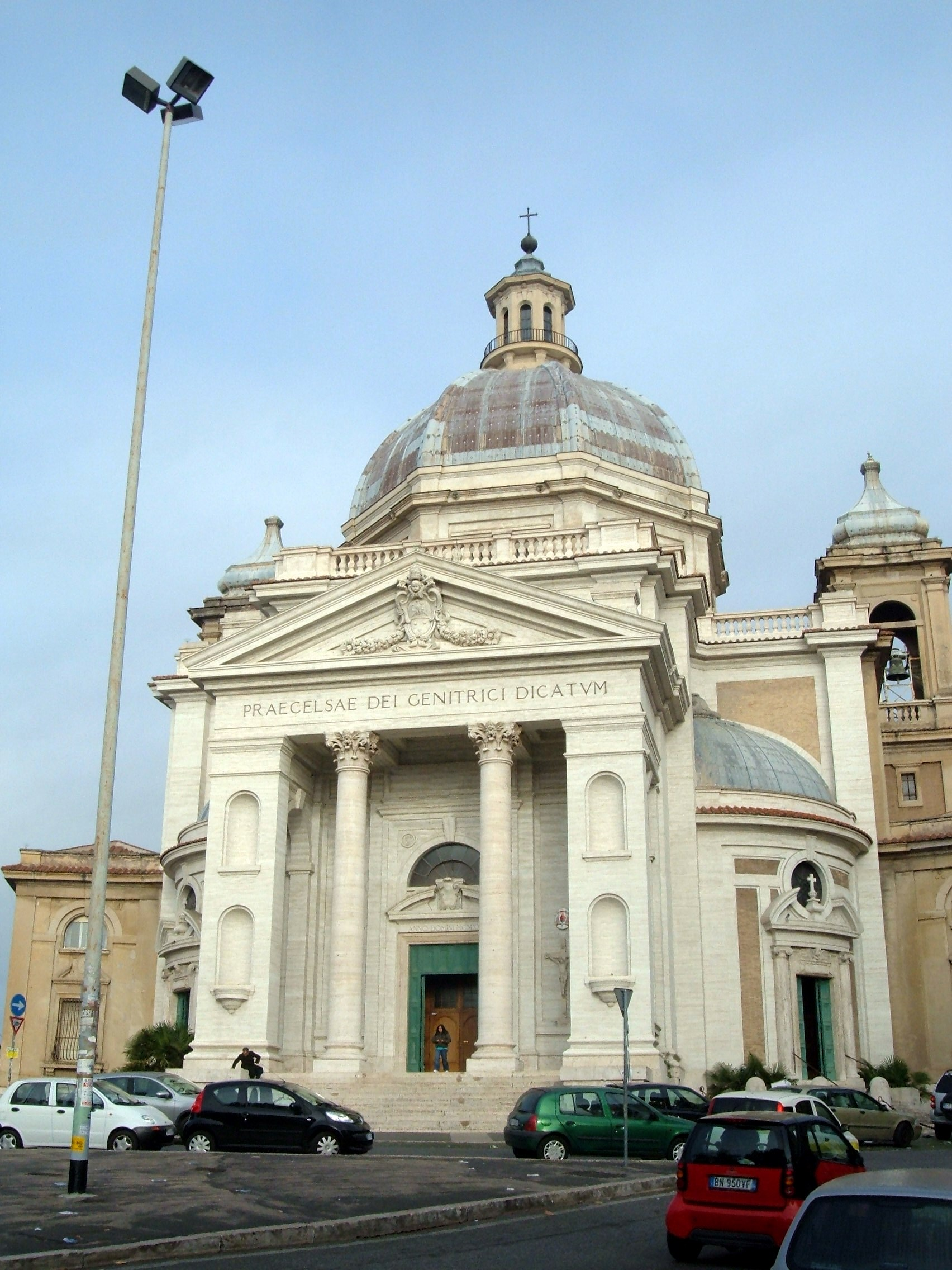 Chiesa della Gran Madre di Dio, a Roma, nel quartiere Della Vittoria.